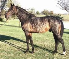 Brindle Horse